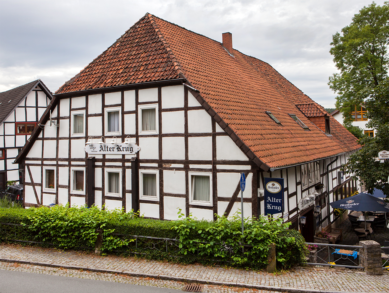 Alter Krug in Talle This is a photograph of an architectural monument.